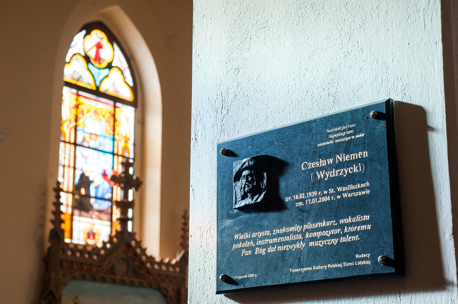 Мемарыяльная дошка ў памяць Чэслава Выджыцкага (Немэна) ў касцёле Св. Пятра і Паўла ў вёсцы Старыя Васілішкі